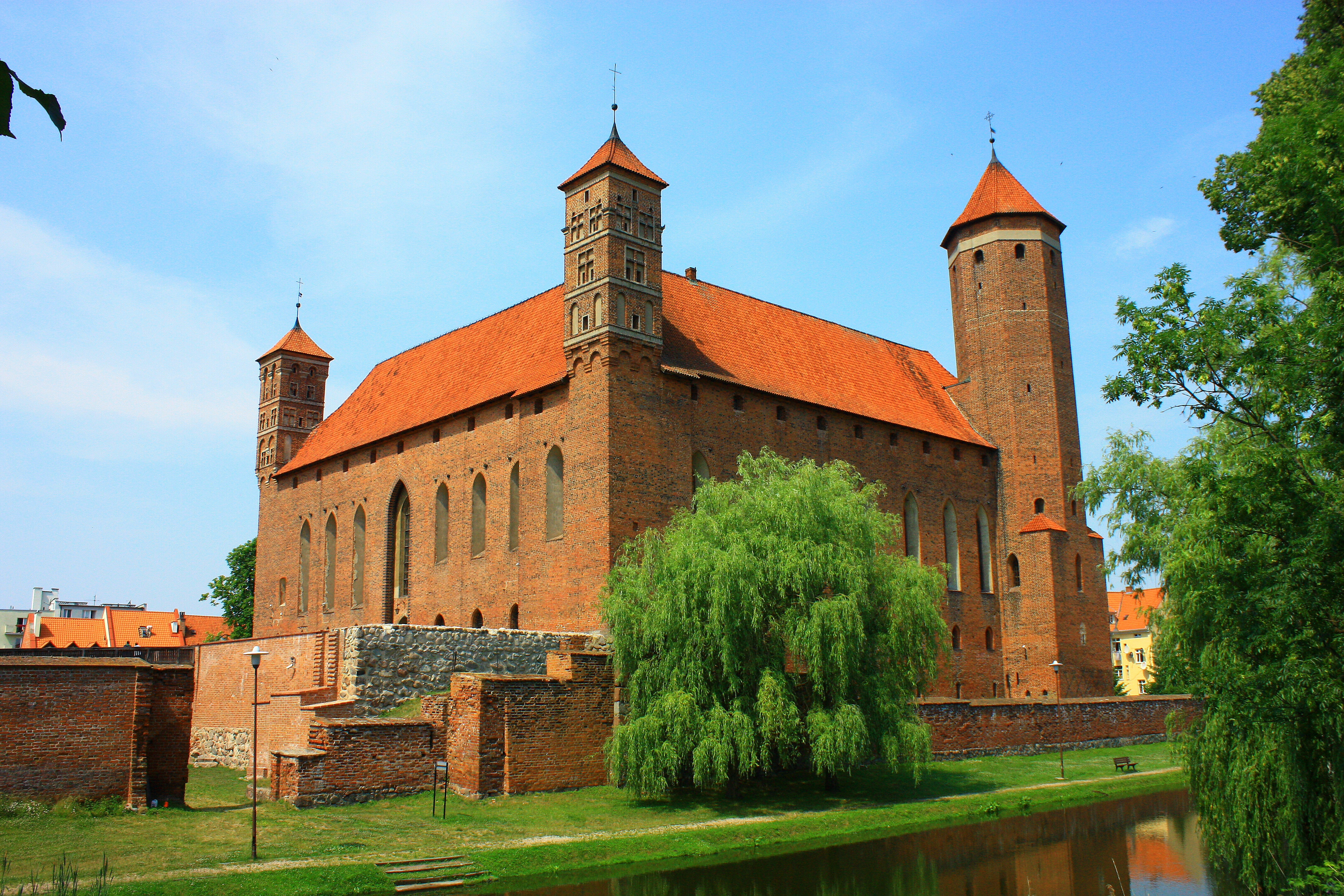 Lidzbark Warmiński, zamek biskupi, ob. muzeum, XIV, XIX